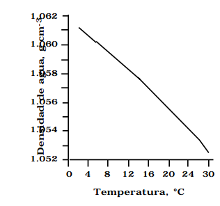 variación de la densidad en función de la temperatura